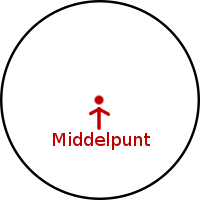 middelpunt van een cirkel - gemaakt door Wilinckx met behulp van Dia, The Gimp en optipng. Indien er copyright kan vallen op zulke eenvoudige afbeeldingen plaats ik deze afbeelding hierbij onder publiek domein